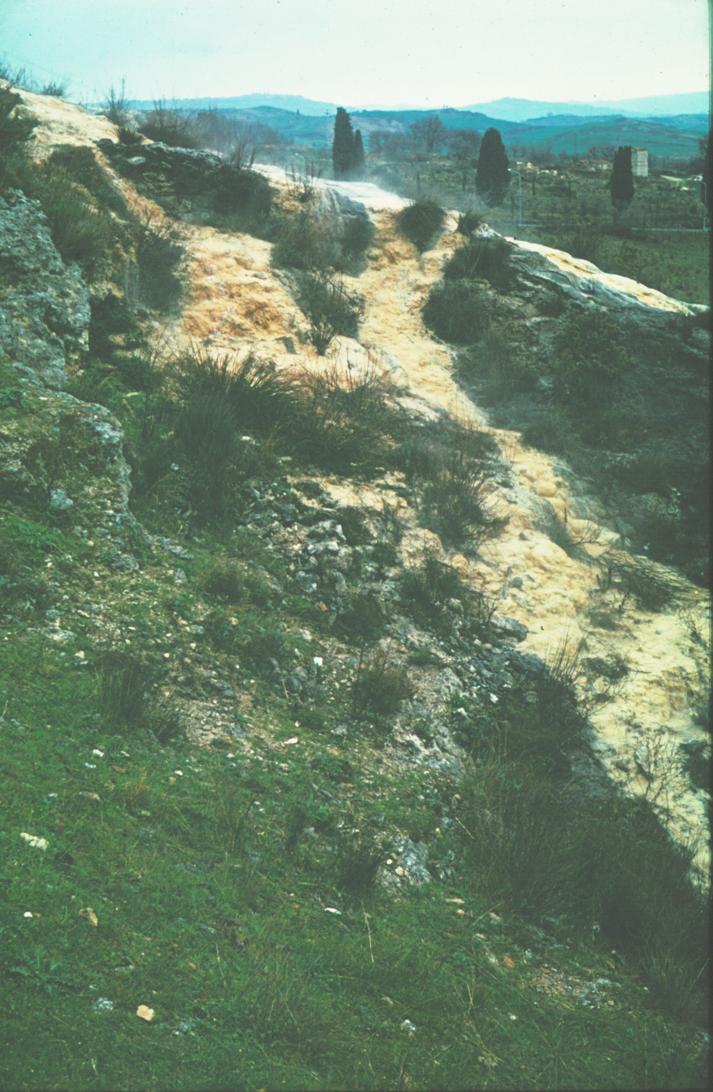 Travertin-Bildung an einer Thermalquelle bei Bagno Vignoni, Toscana, Italien